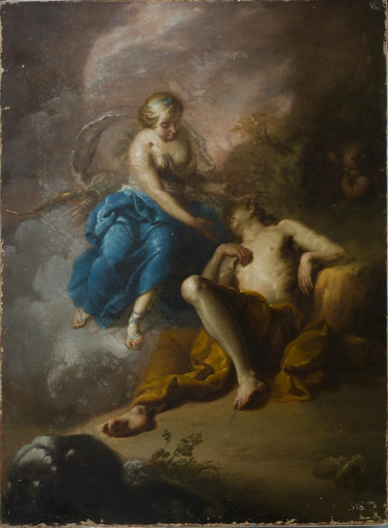 La obra representa a Endimión, personaje de la mitología griega.